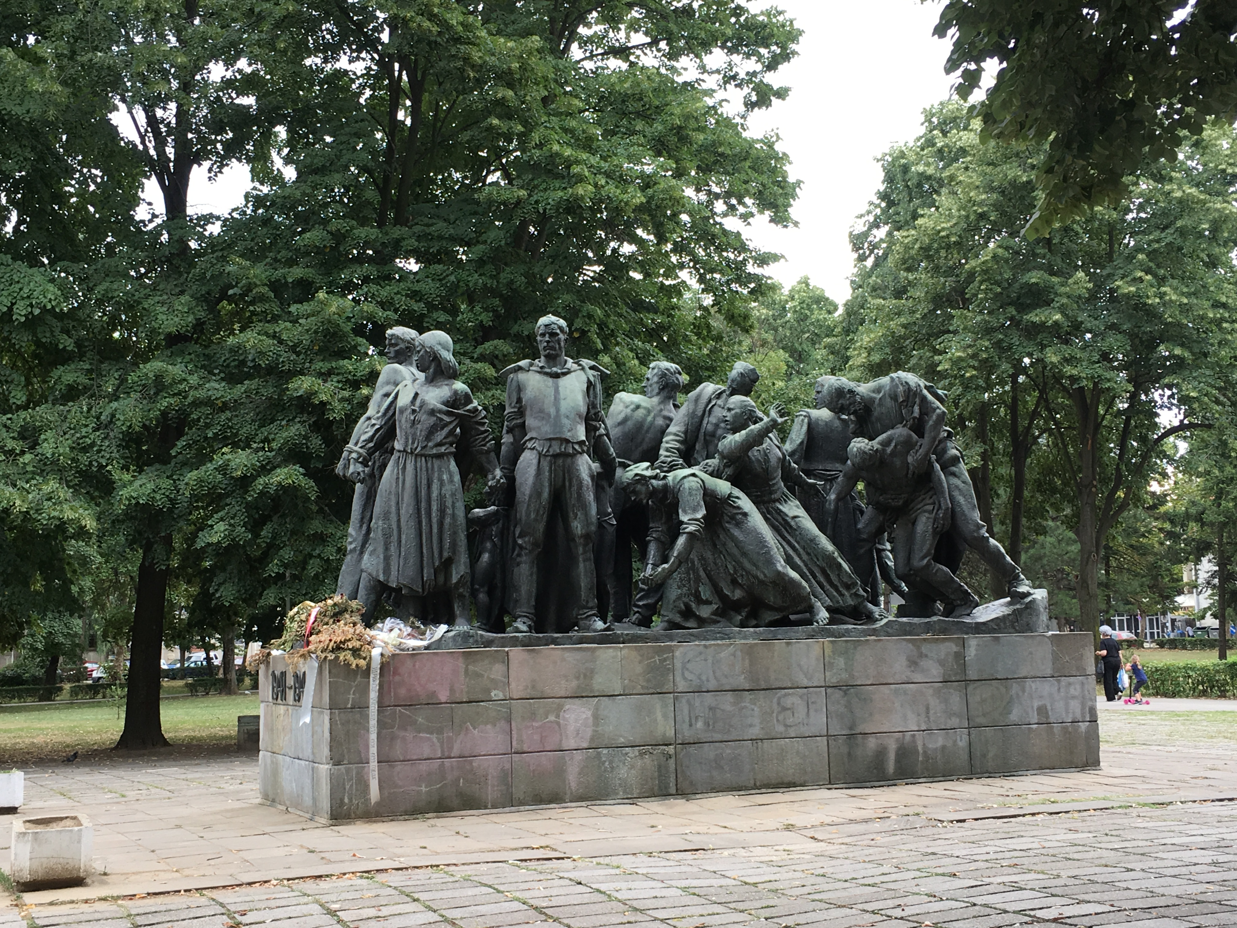 Spomenik otpora i stradawa u Železničkom parku u Kraljevu, foto-tura na Edu Viki kampu 2017.